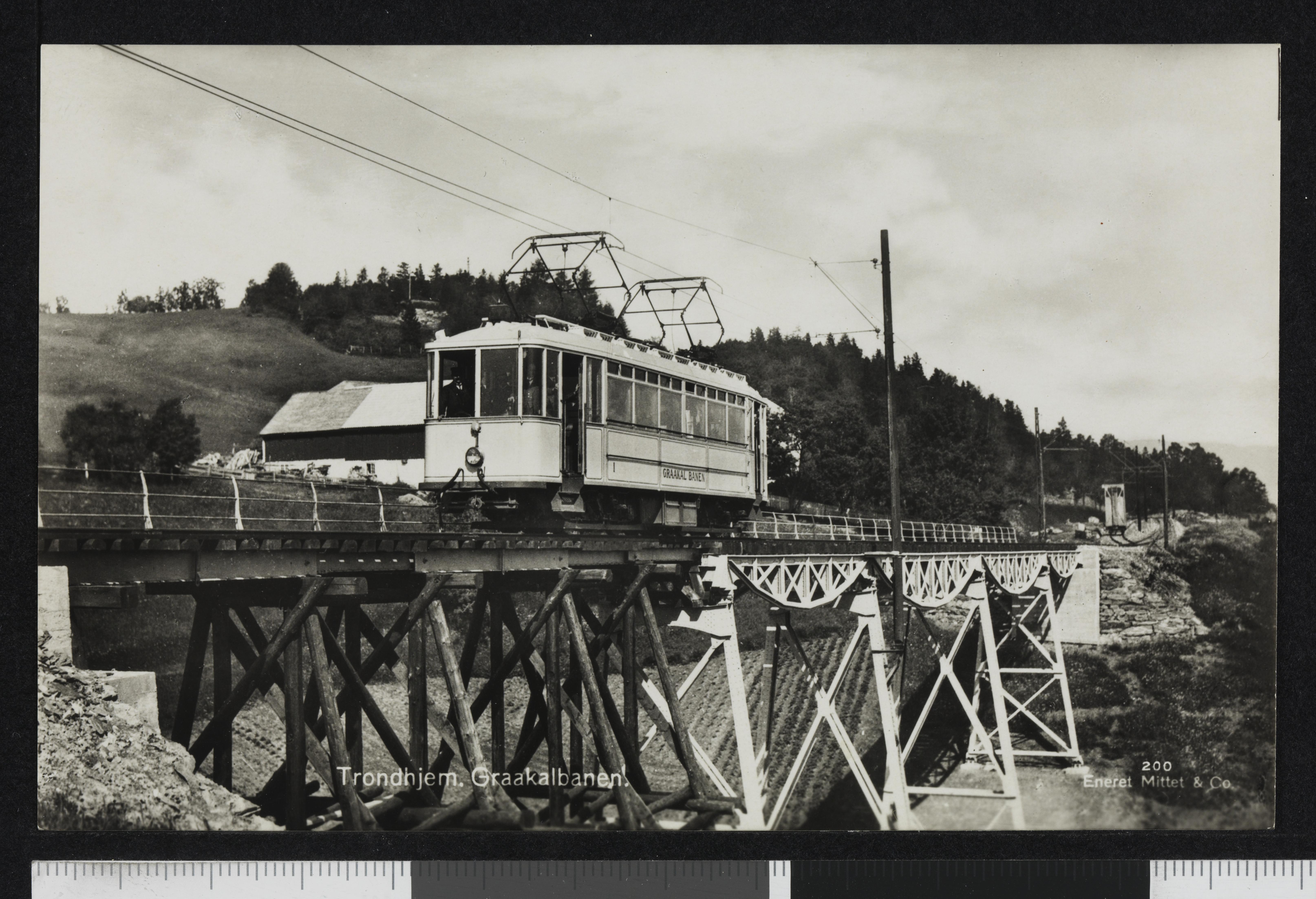 Bildet er hentet fra Nasjonalbibliotekets bildesamling Byåsen,Hoemsbrua, Trondheim, Sør Trøndelag